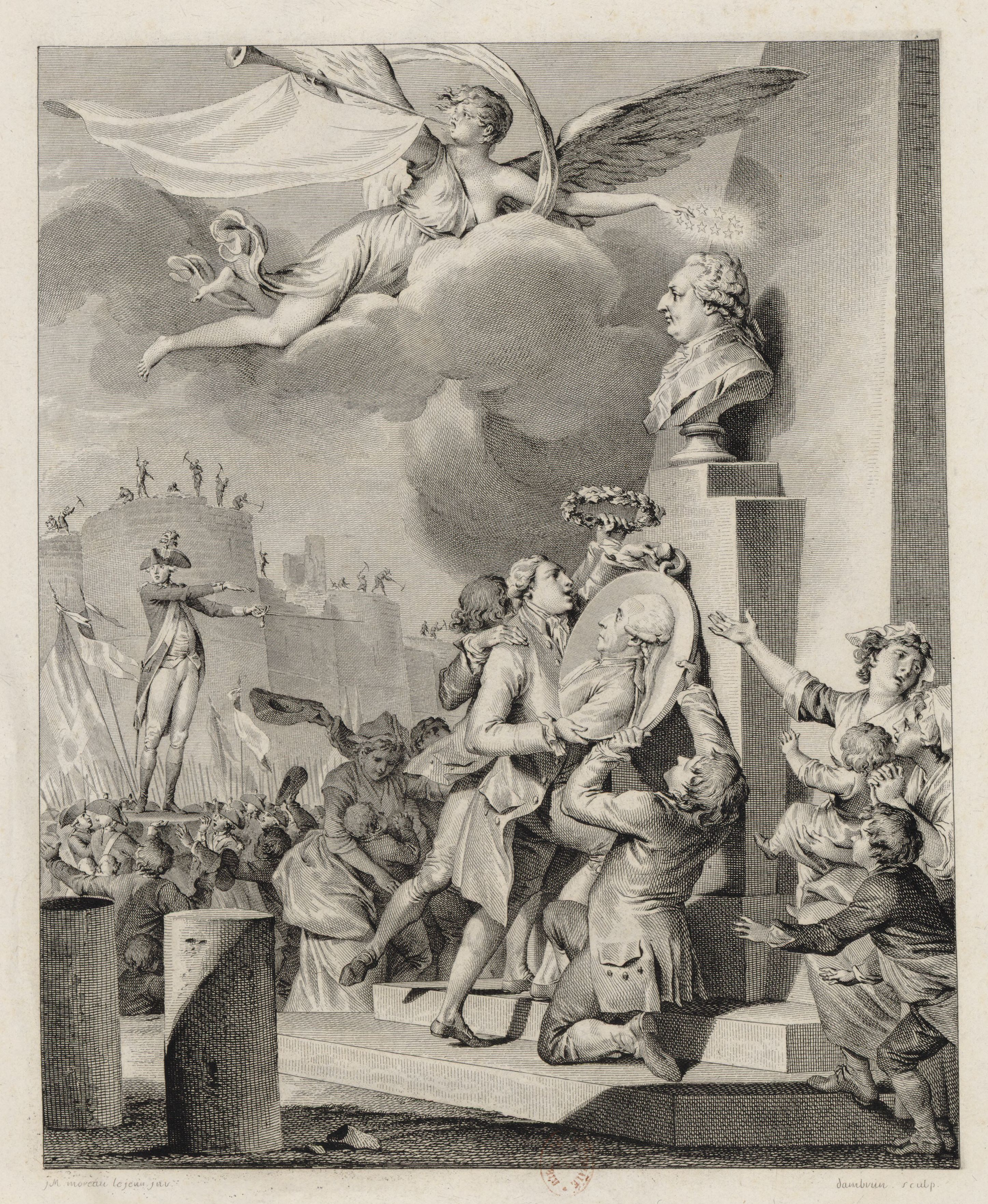 Révolution Française. Histoire. A un peuple libre. Le peuple (femmes, enfants..) accalame le buste de Louis XVI érigé sur un piédestal, le bas-relief à l'effigie de Bailly et le général de Lafayette porté par les soldats; allégorie de la Renommée, trompette, étendard inscrit "l'An 1er / de la / Révolution"; la prison de la Bastille en démolition, drapeaux, colonnes, couronne de lauriers. Référence à l'arrivée de Louis XVI à l'Hôtel de Ville de Paris, qui reçoit la nouvelle "Cocarde nationale" du nouveau maire de Paris, l'astronome Bailly. A cette occasion, le roi approuve publiquement la formation de la garde bourgeoise et les nominations de Bailly à la mairie, de Lafayette à la tête de la garde.